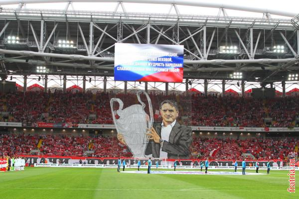 Перформанс в честь первого матча Дмитрия Аленичева в качестве тренера